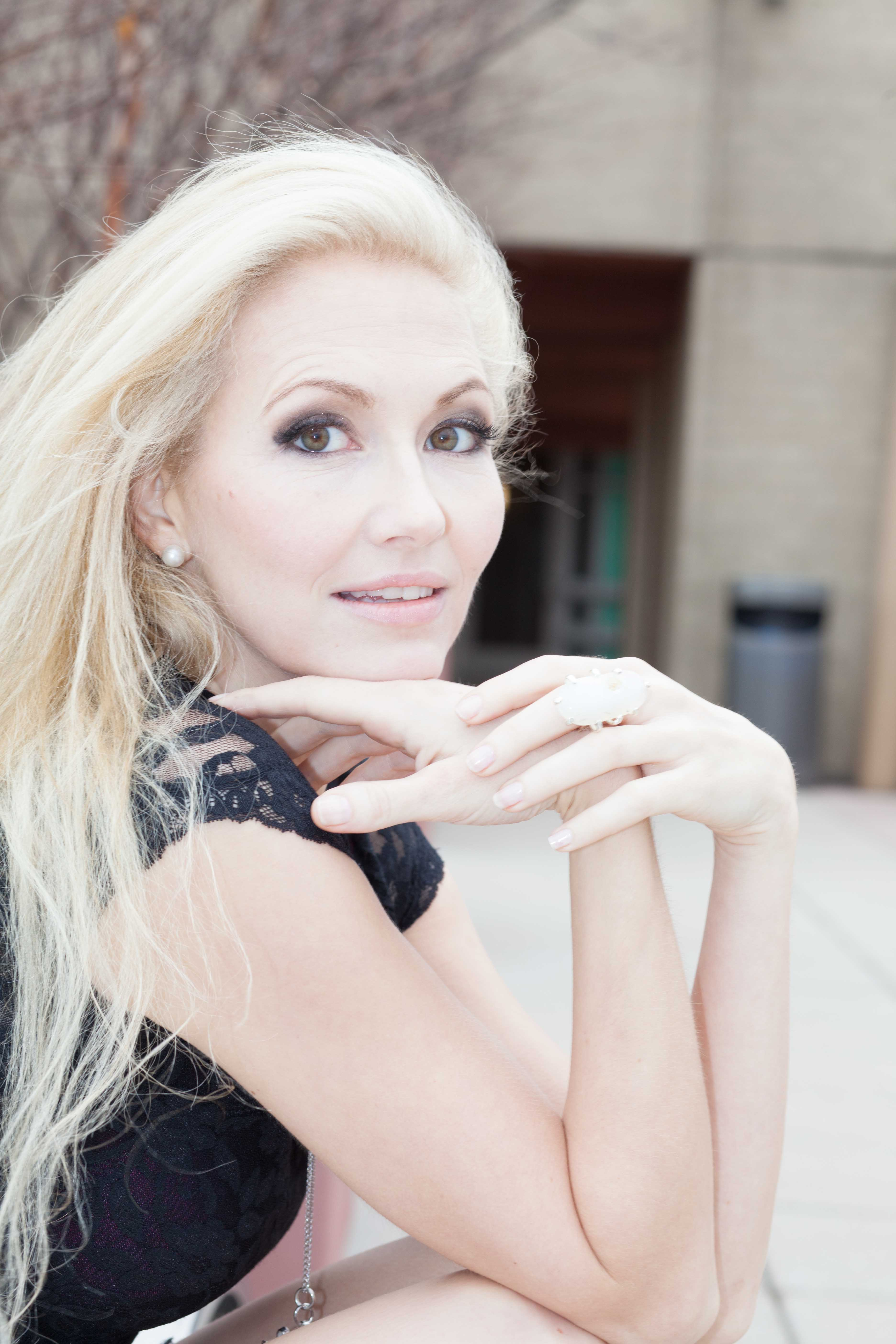 Dísella Lárusdóttir í myndatöku í New York, ljósmyndari er Fay Fox.